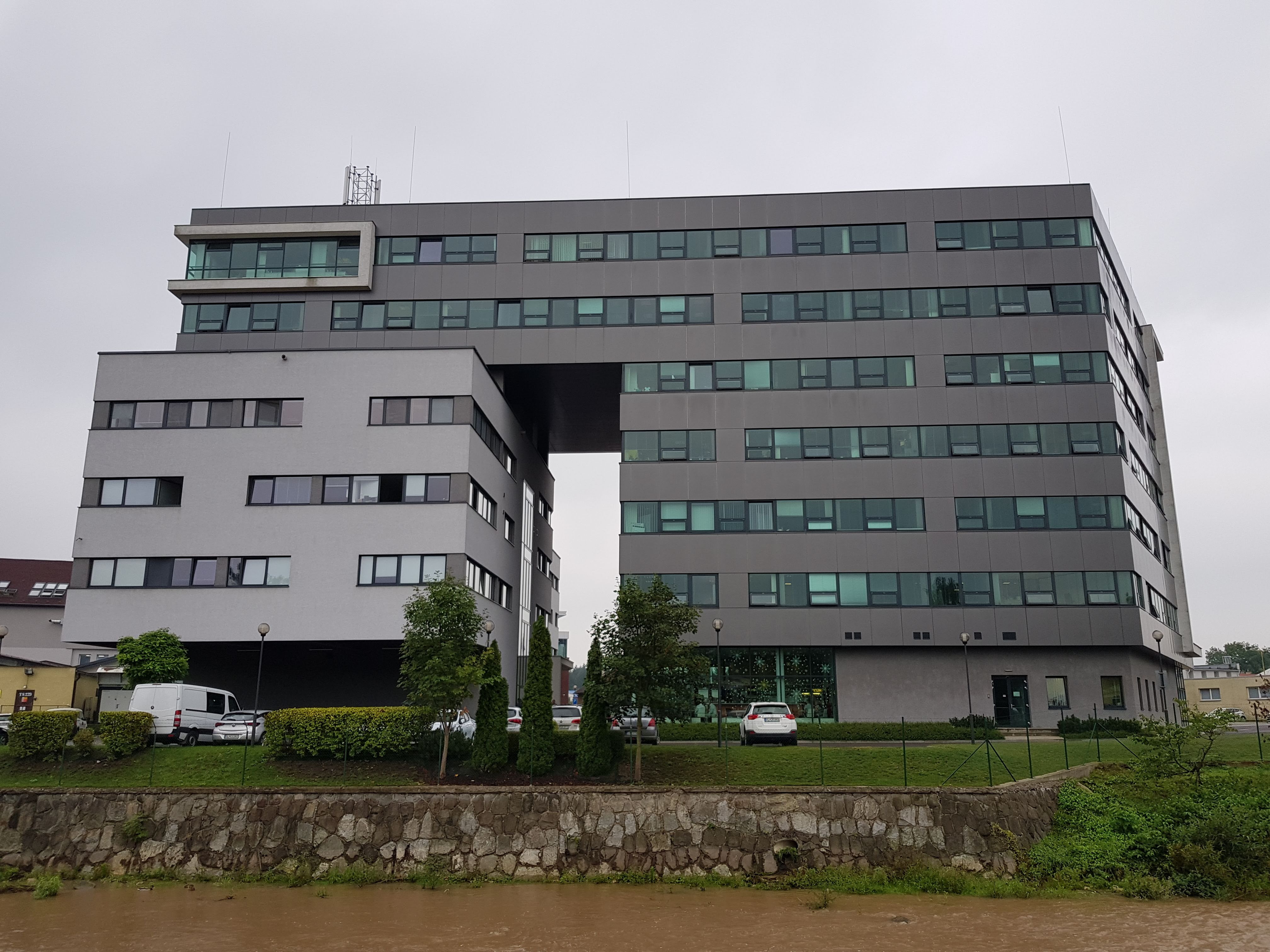 Budova SSE v Žiline